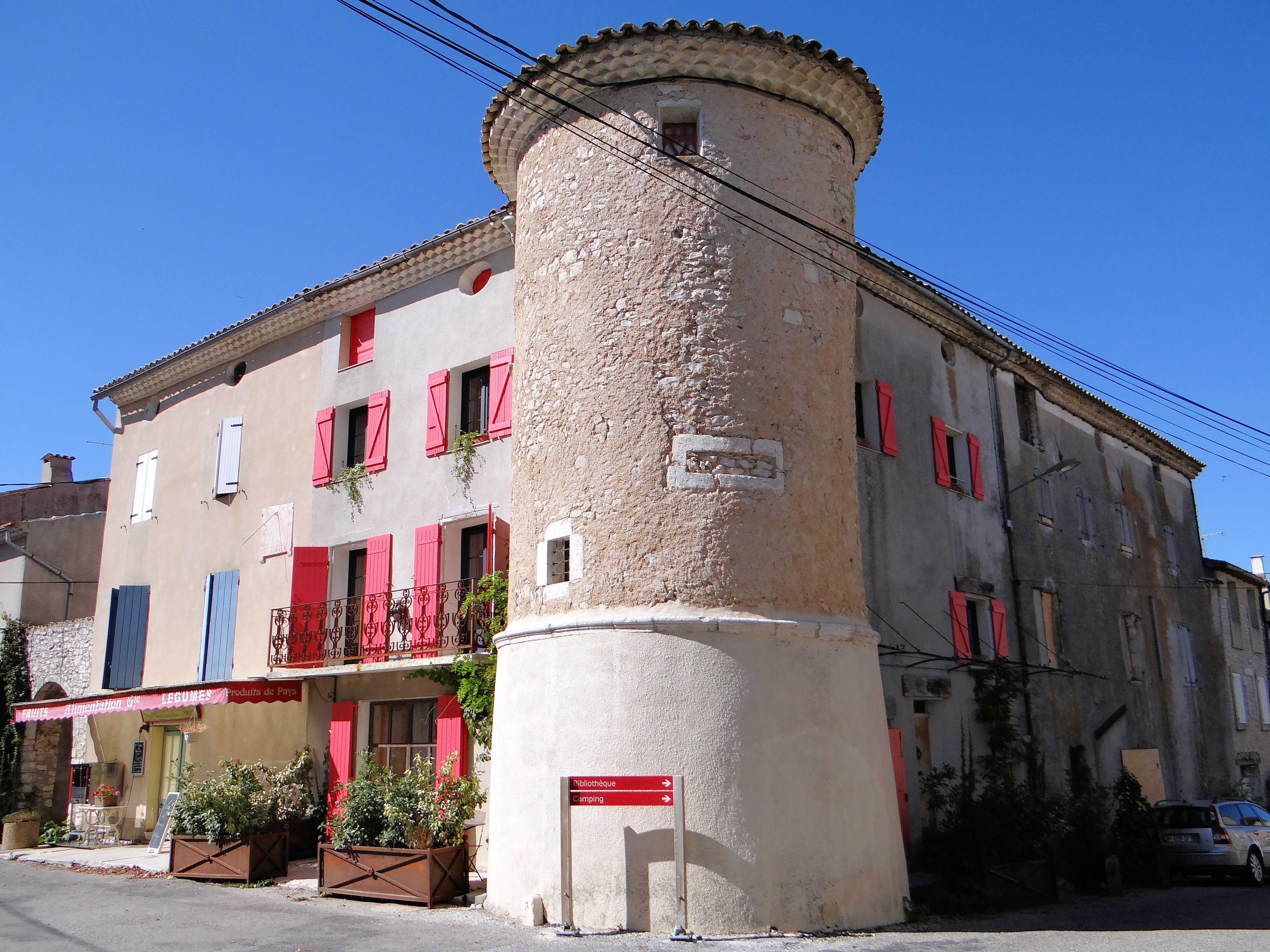 Revest-du-Bion - Une tour de défense du village